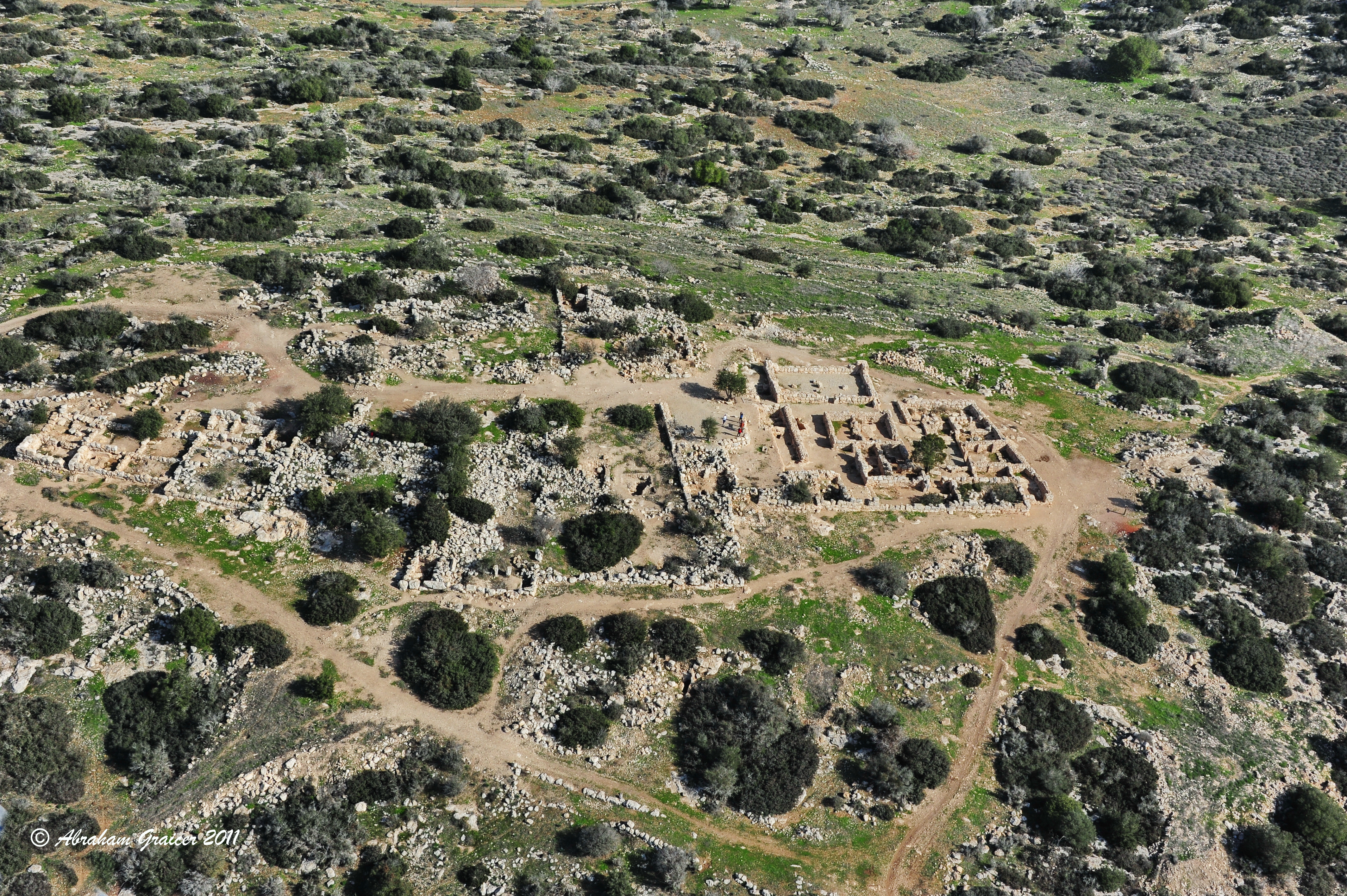 שרידי יישוב על גבעה, בחפירות שנערכו, נחשפו מבנים, מבנה מרכזי (בית כנסת?), מערות מסתור, מקוואות (5), מערות קבורה - אחת מעוטרת וגת חצובה.